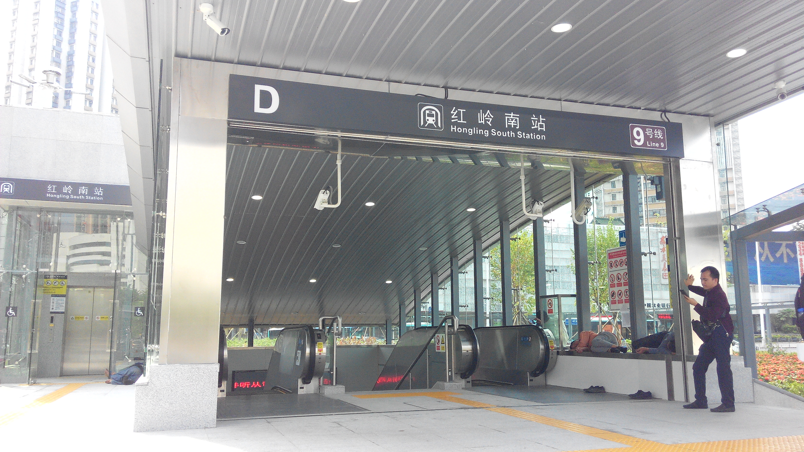 深圳地铁9号线 红岭南站 D出口